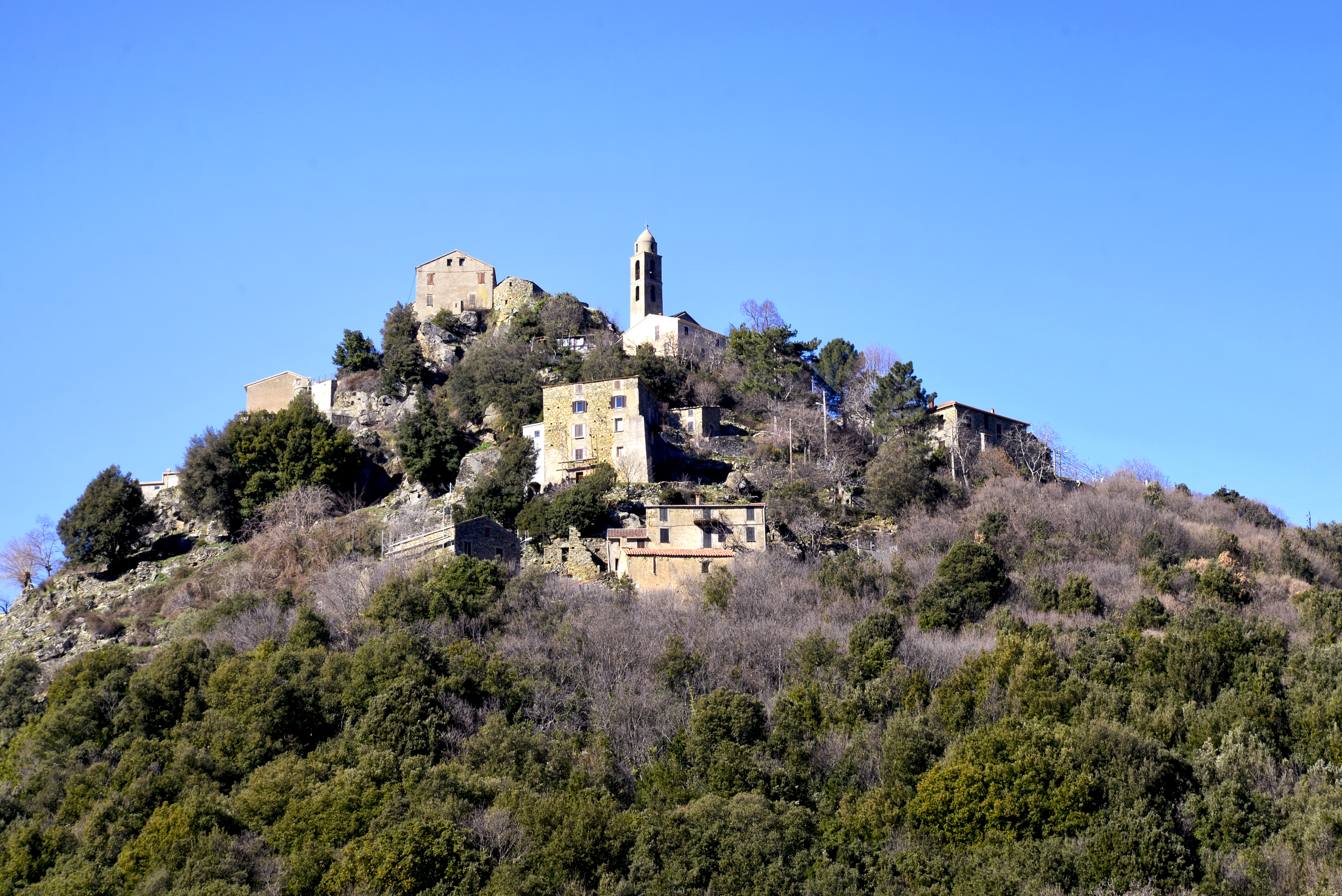 Santa-Lucia-di-Mercurio, Bozio (Haute-Corse) - Vue du village en nid d'aigle depuis Piedivaldo (u Pian di Vallu) son hameau.